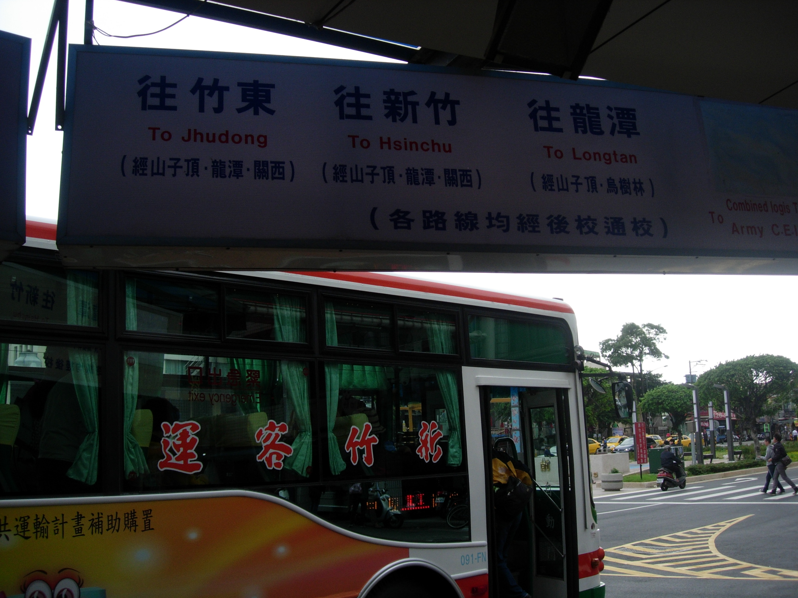 中文（台灣）: 新竹客運中壢北站月台看版